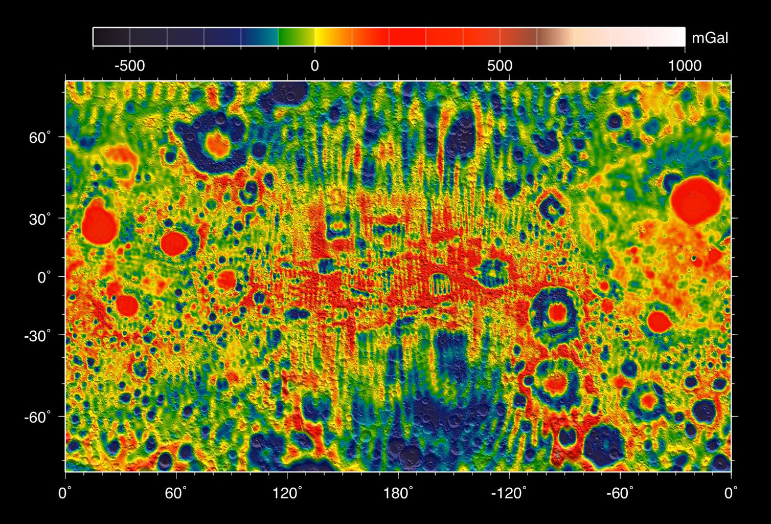 Гравитационное поле Луны с использованием данных Lunar Prospector